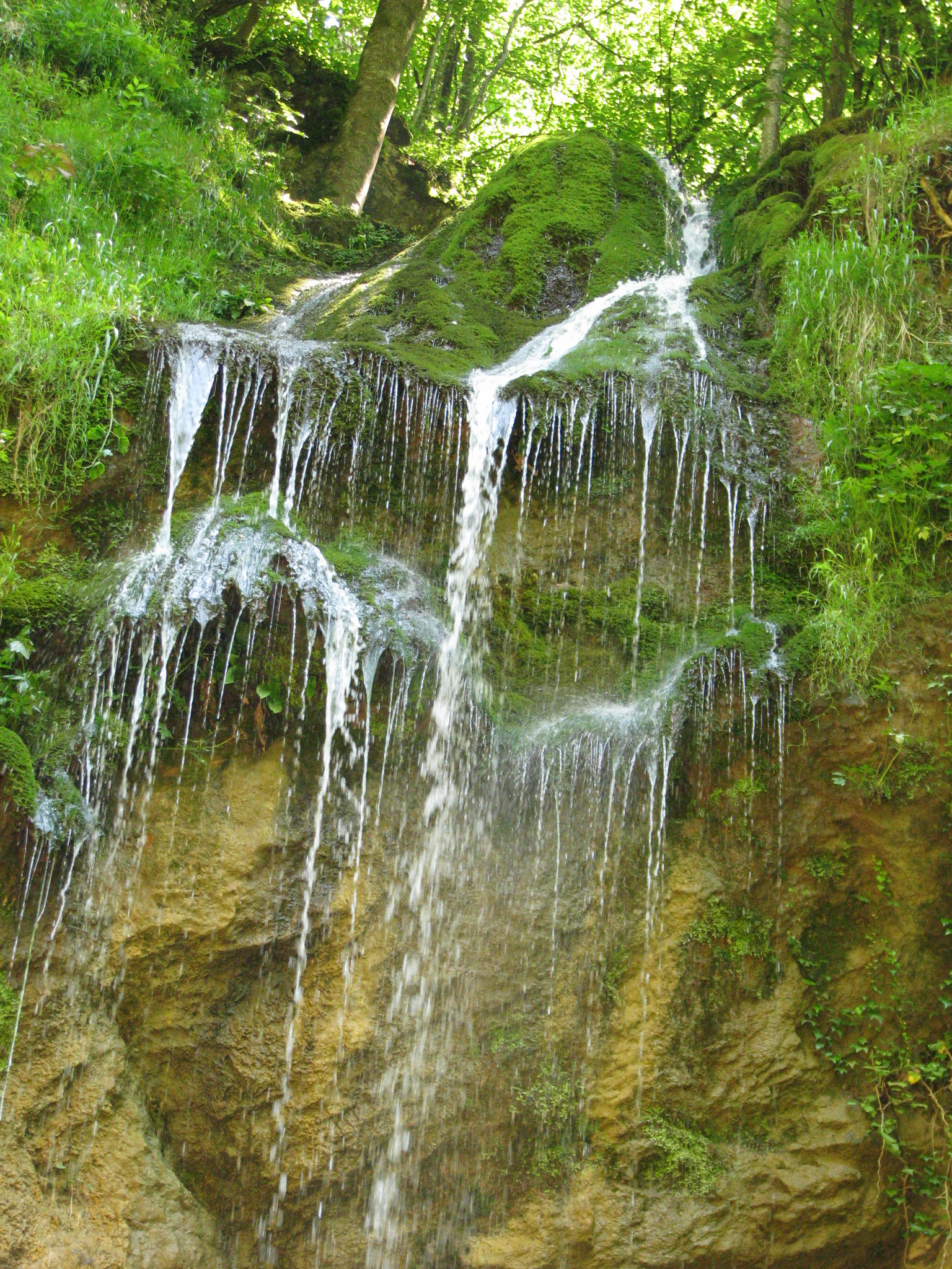 Slap Brisalo